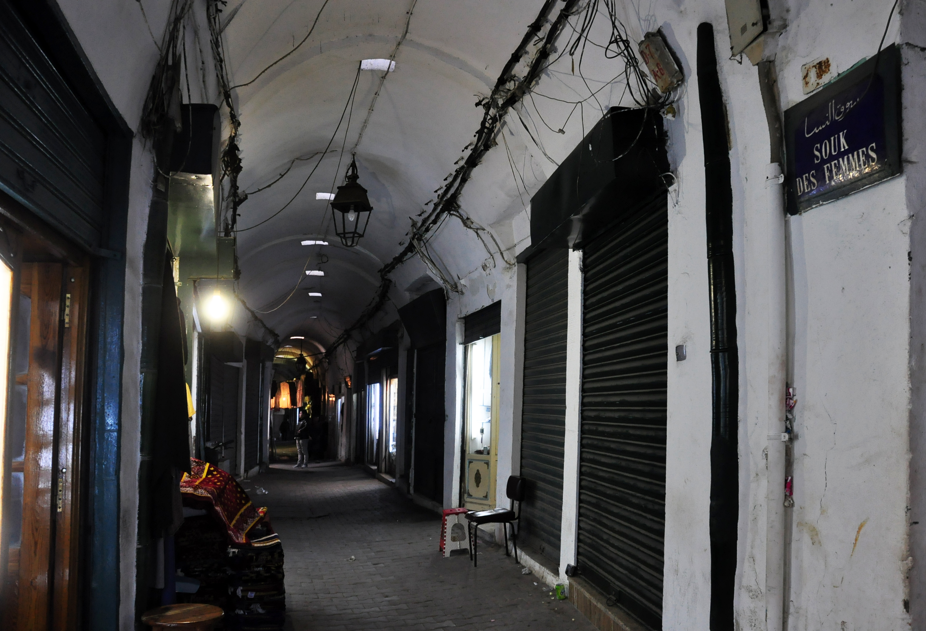 vue général sur le souk des femmes